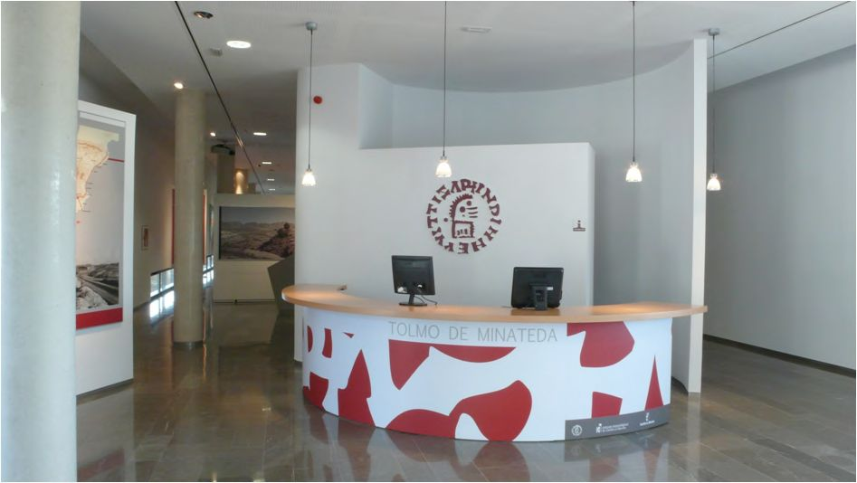 xx